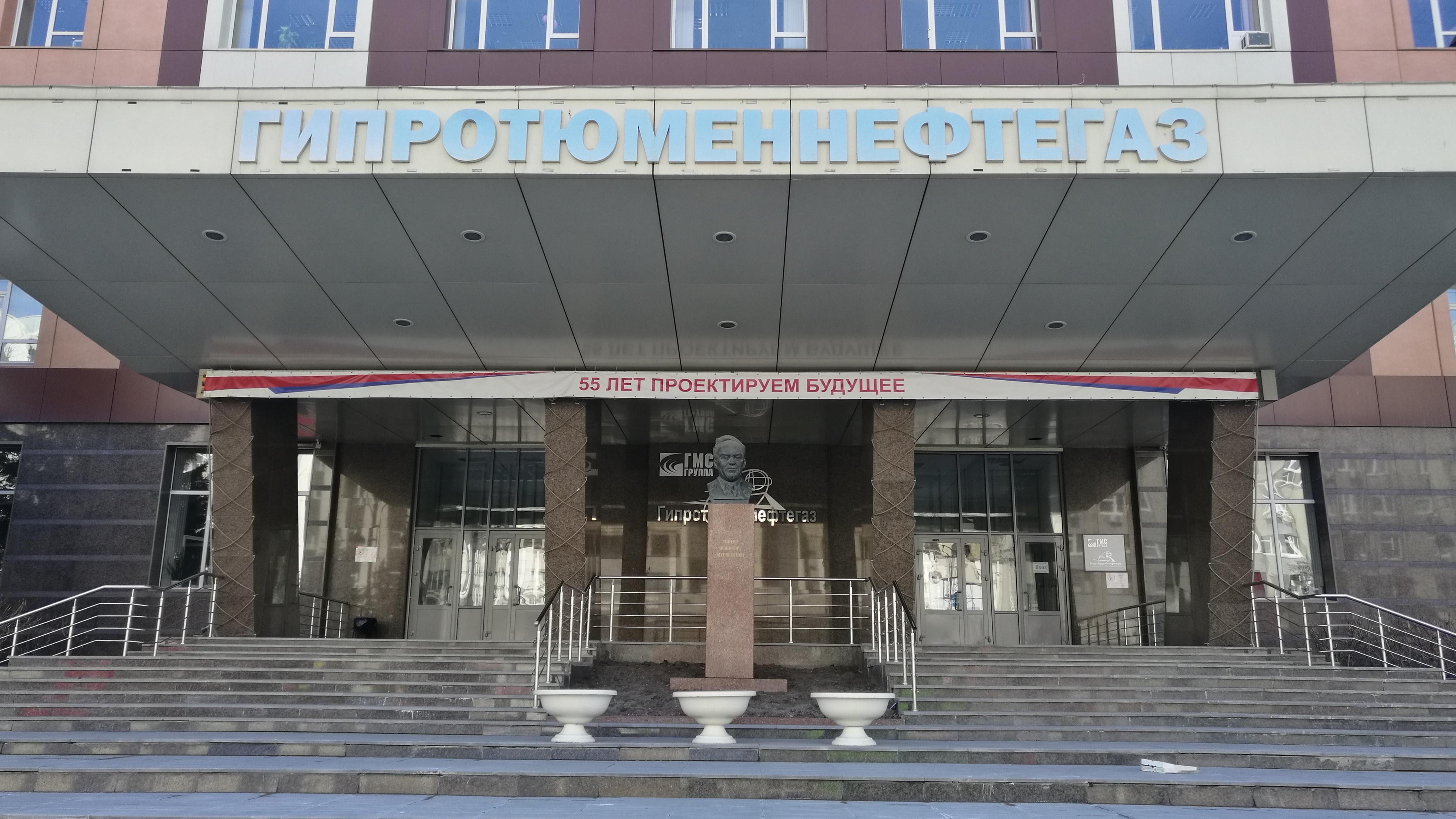 Giprotjumenneftegazo. Tjumeno, Rusio.